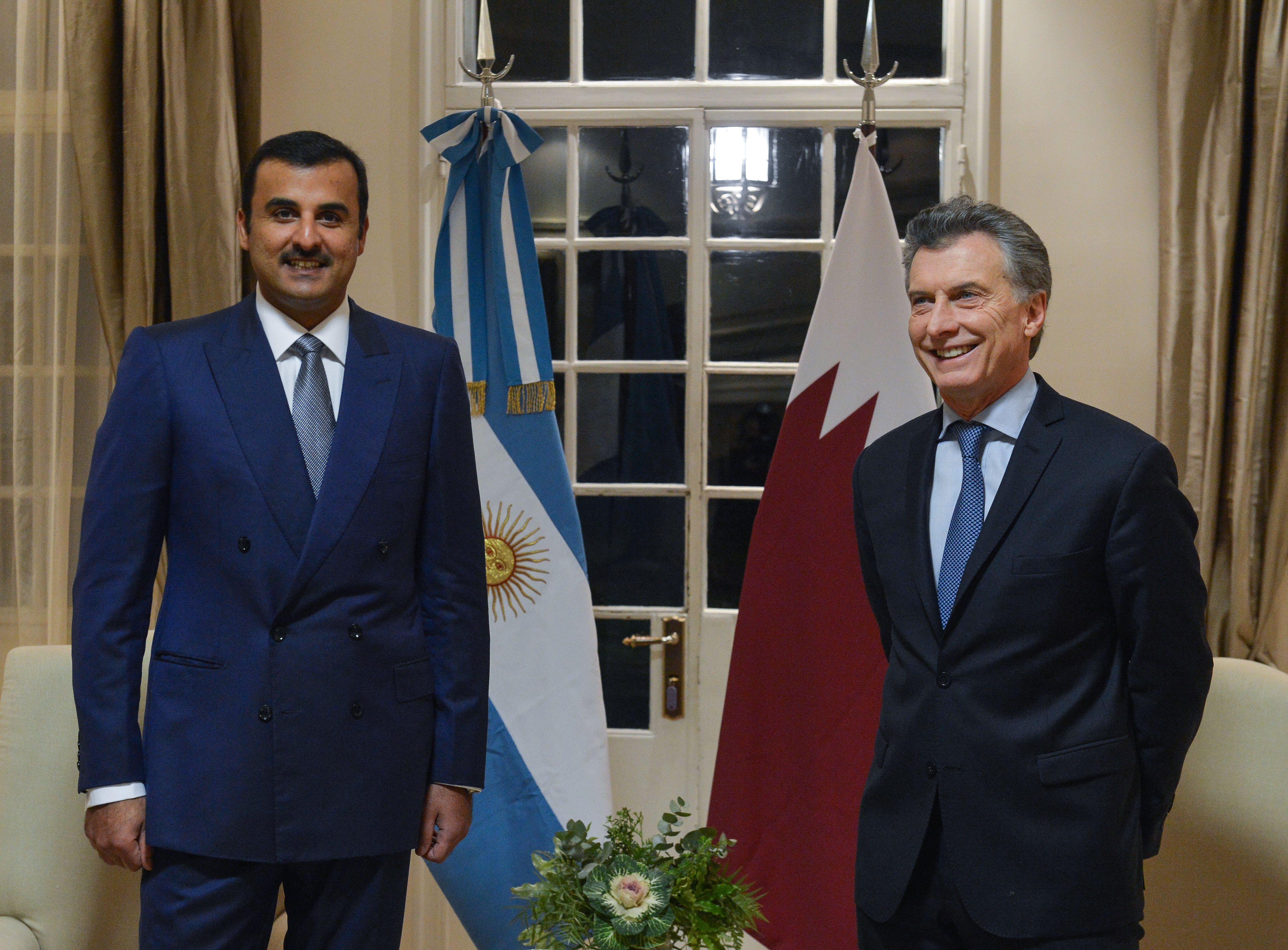 El presidente Mauricio Macri recibió al Emir de Qatar, Sheik Tamim bin Hamad Al Thani, con el objetivo de incrementar la cooperación y el comercio bilateral y fomentar la inversión para áreas clave del país como agroindustria, infraestructura y energía.